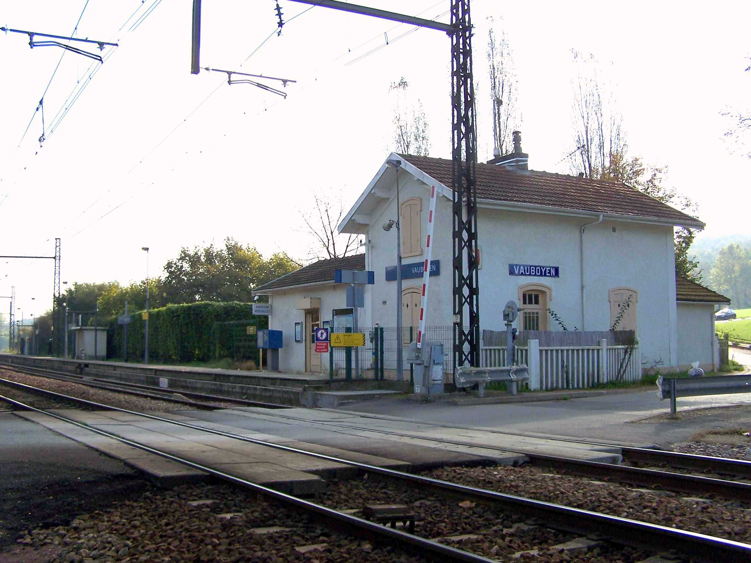 Gare de Vauboyen (Essonne, (France)